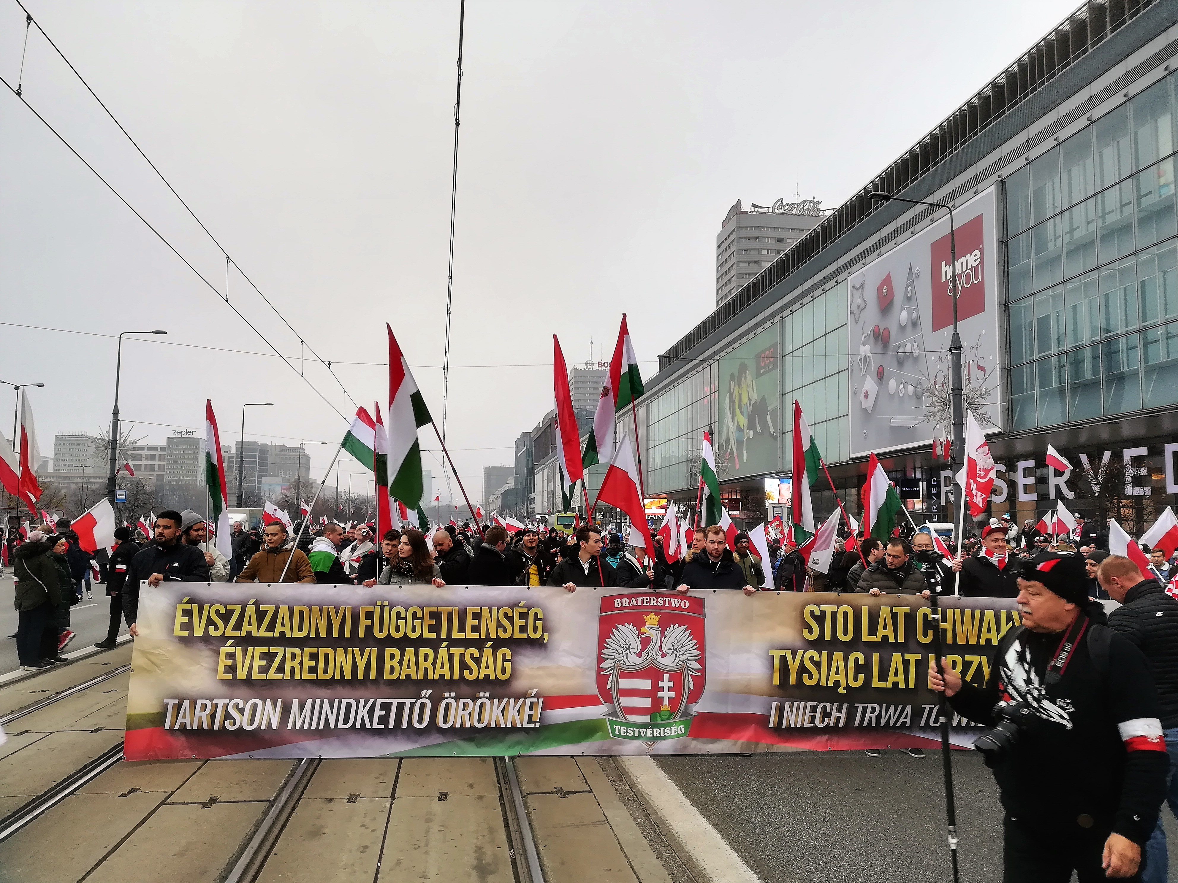 Marsz Niepodległości w Warszawie - 11 listopada 2018r. Stulecie odzyskania Niepodległości przez Polskę po 123 latach zaborów.